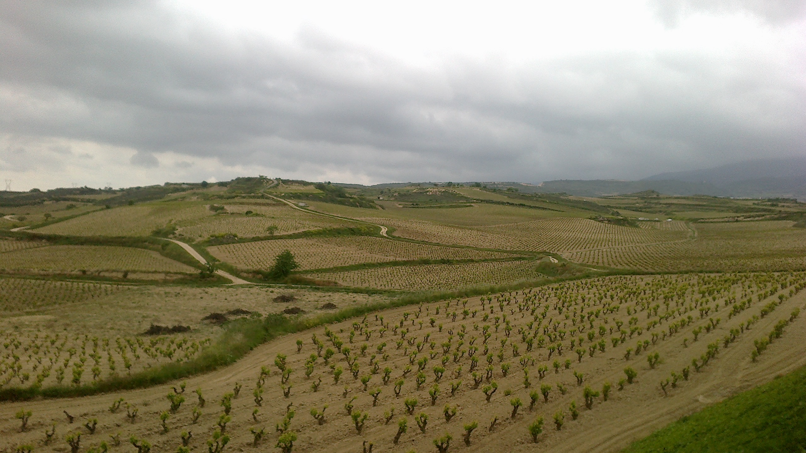 Villabuena Arabako mahastiak